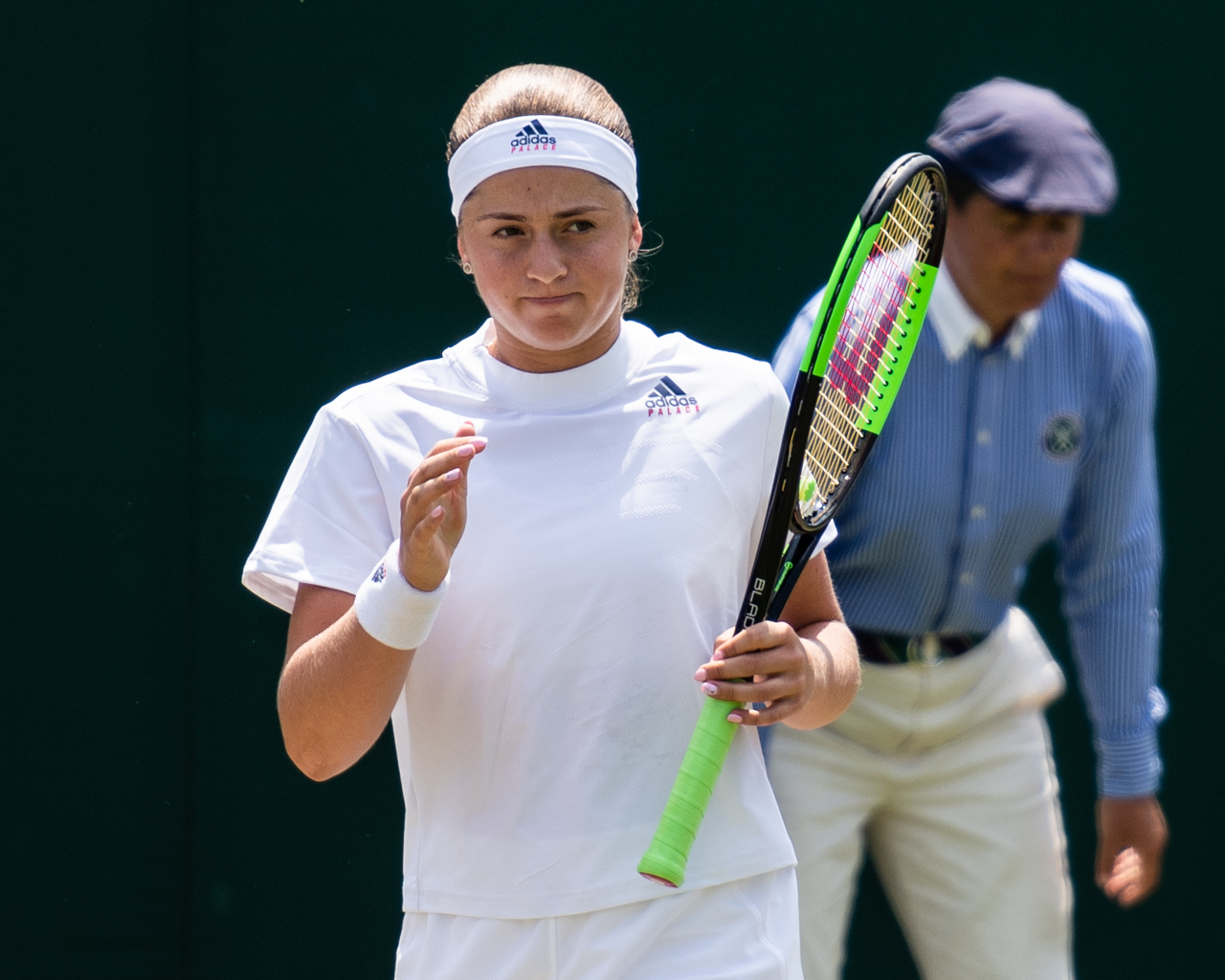 Jelena Ostapenko